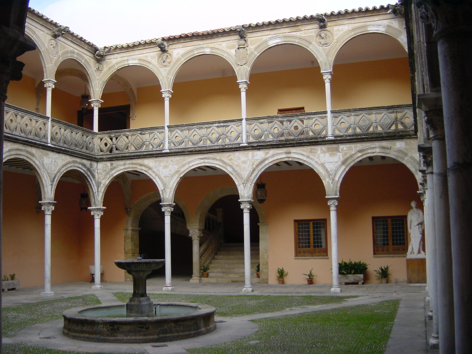 Casa de las Torres, Úbeda (Jaén, Andalucía, España)